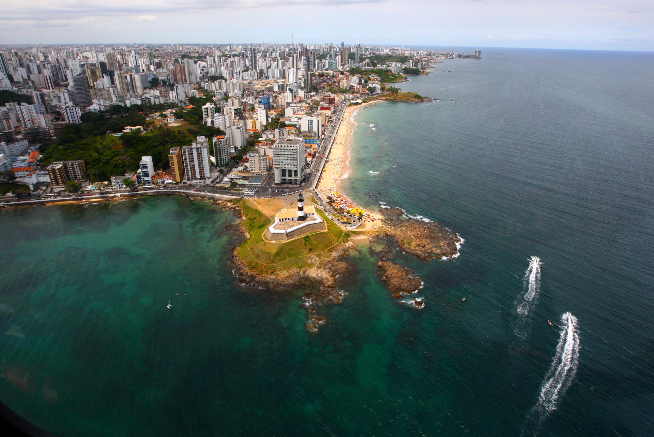 Salvador turismo no carnaval 2010 Foto Manu Dias/AGECM